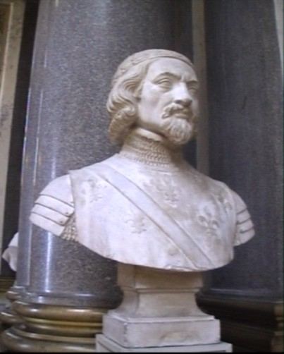 buste de la galerie des batailles du château de Versailles